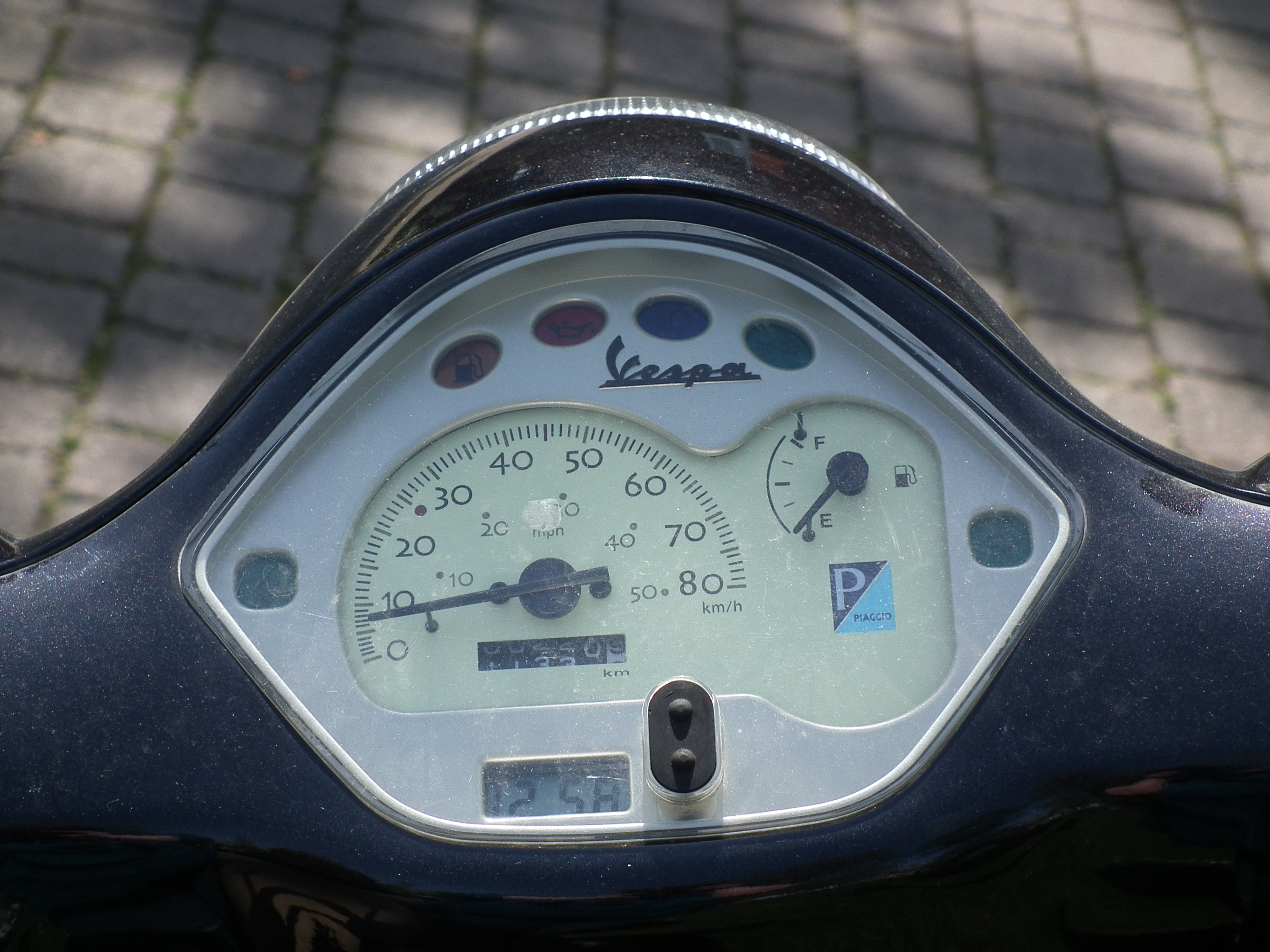 Tachometer einer Vespa